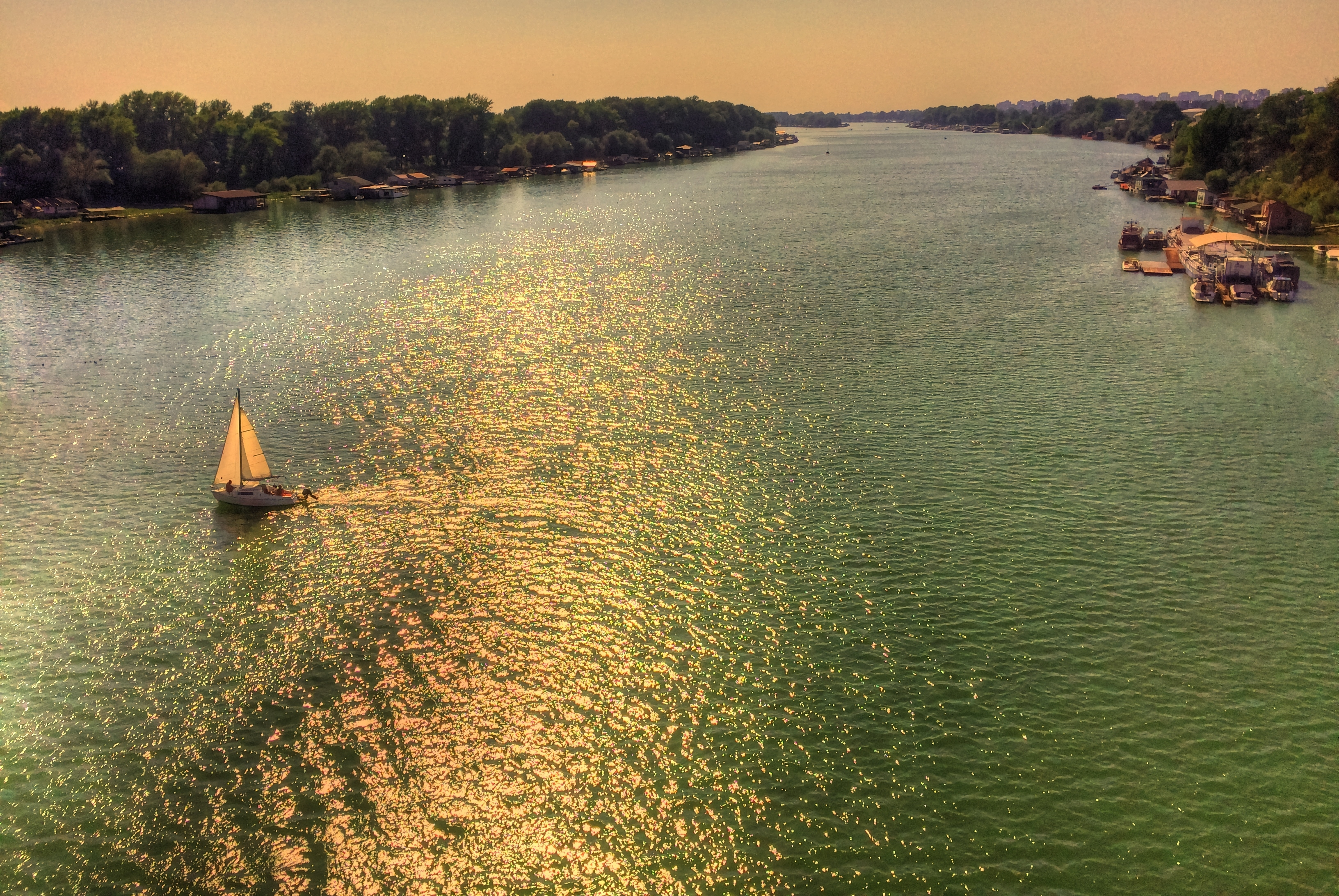 River Sava